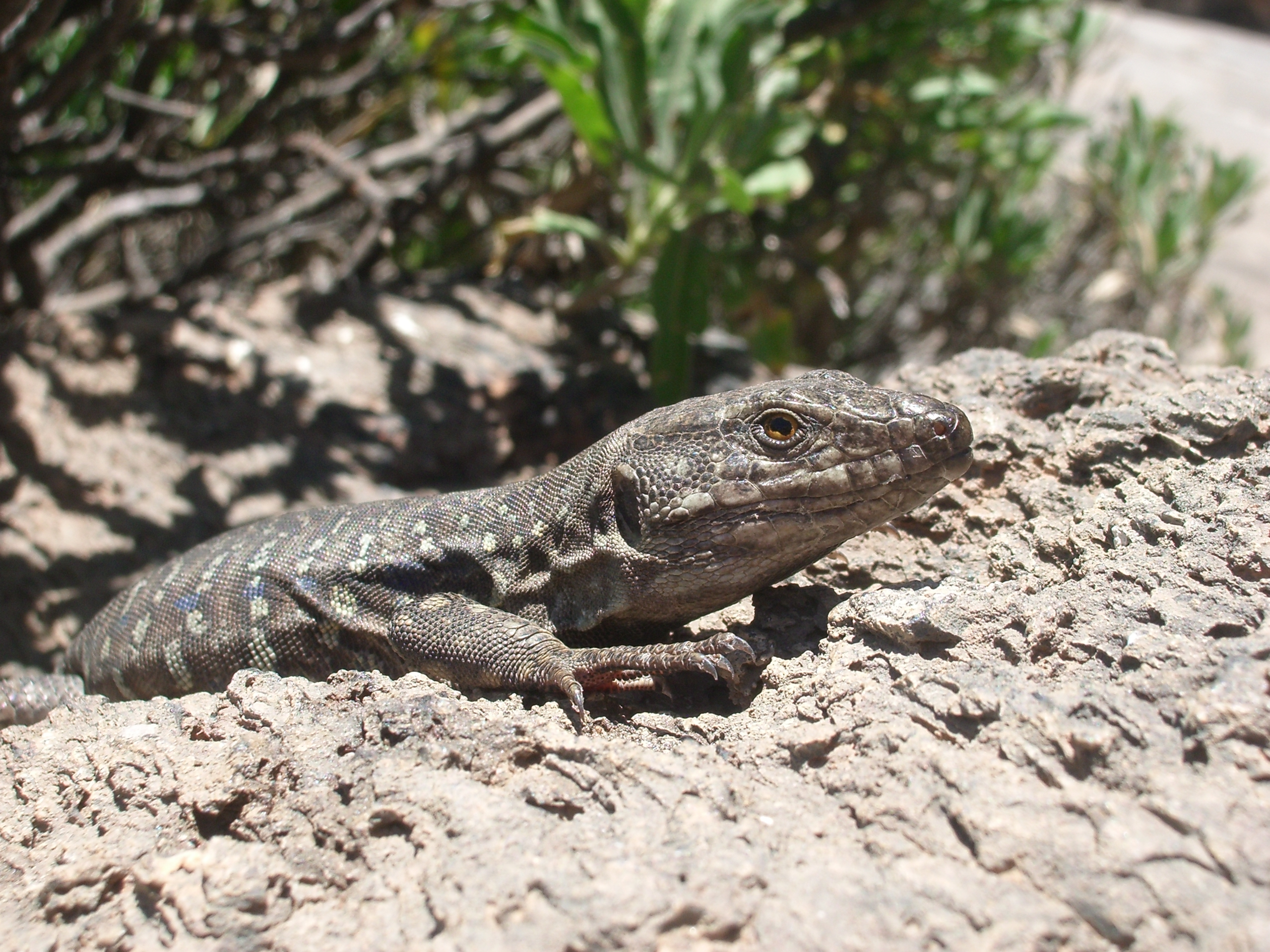 Primer plano de un joven macho de Gallotia galloti, en el Parque Nacional del Teide